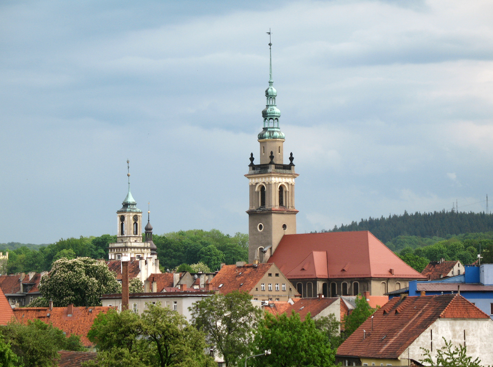 Zdjęcie Ratusza i Kościoła Św. Piotra i Pawła w Świebodzicach (zabytek nr A/1828/1687 z dn. 12.05.1966)